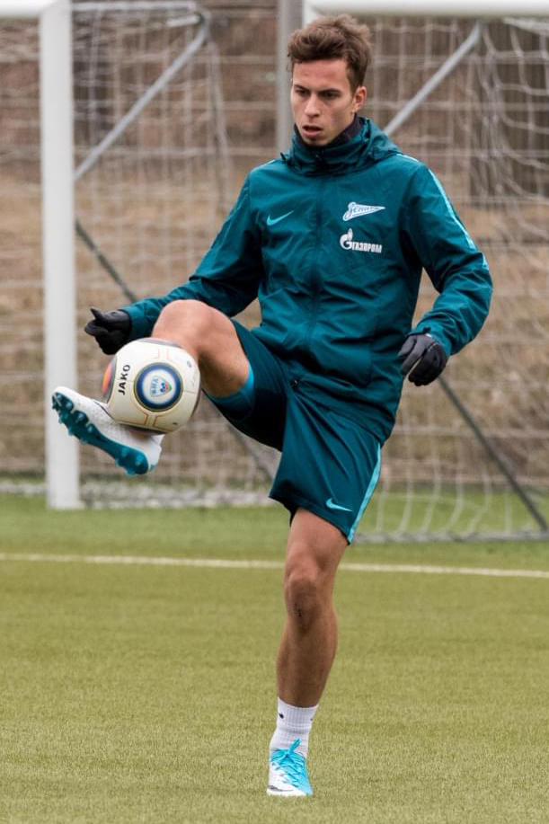 06.04.2017. Россия, Санкт-Петербург, Удельный парк. Тренировка «Зенита»-2 перед матчем ФОНБЕТ-Первенство ФНЛ «Тосно» — «Зенит»-2, 2016/17, 30-й тур.